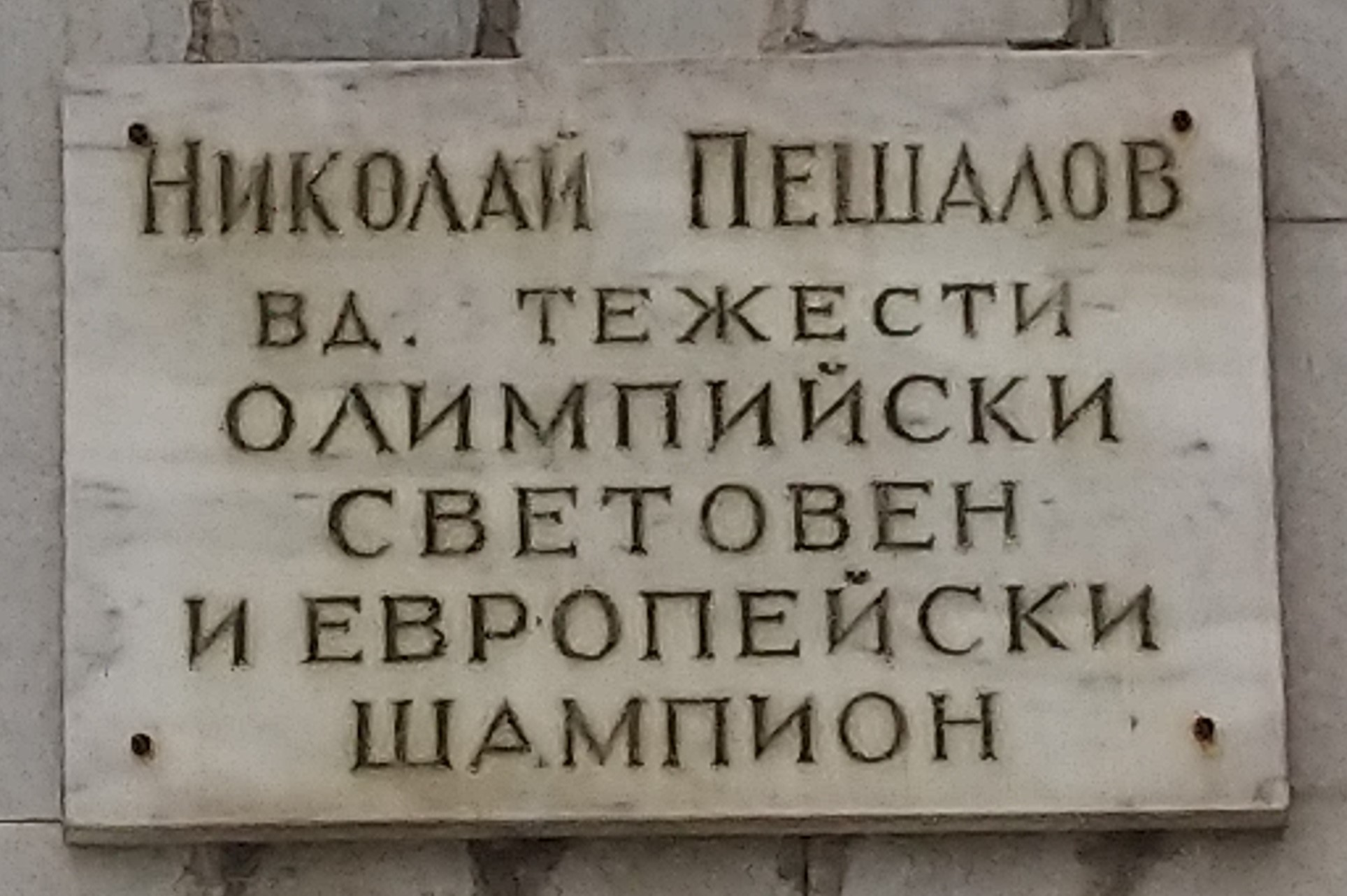 Паметна плоча на спортиста Николай Пешалов (вдигане на тежести) на фасадата на спортна зала "Васил Левски", Пазарджик